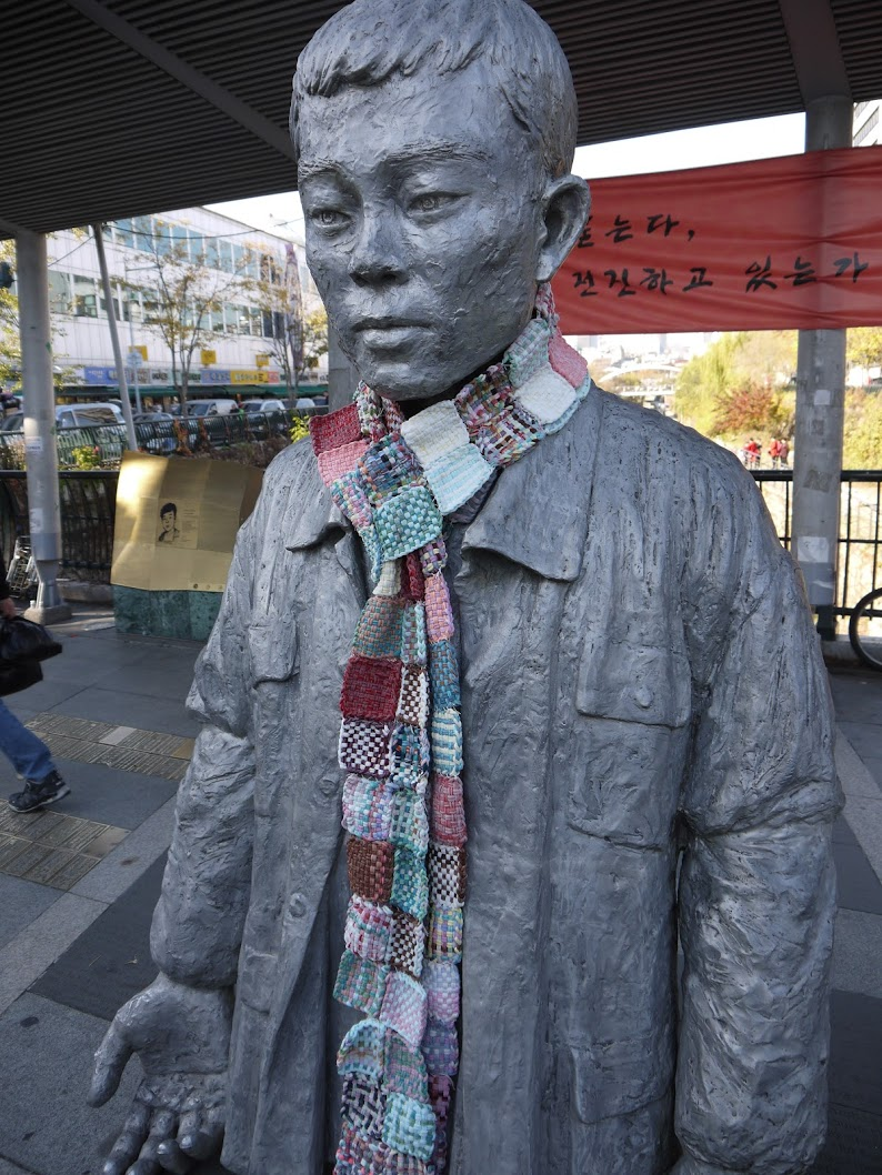 2018.11撮影韓国東大門清渓川付近において